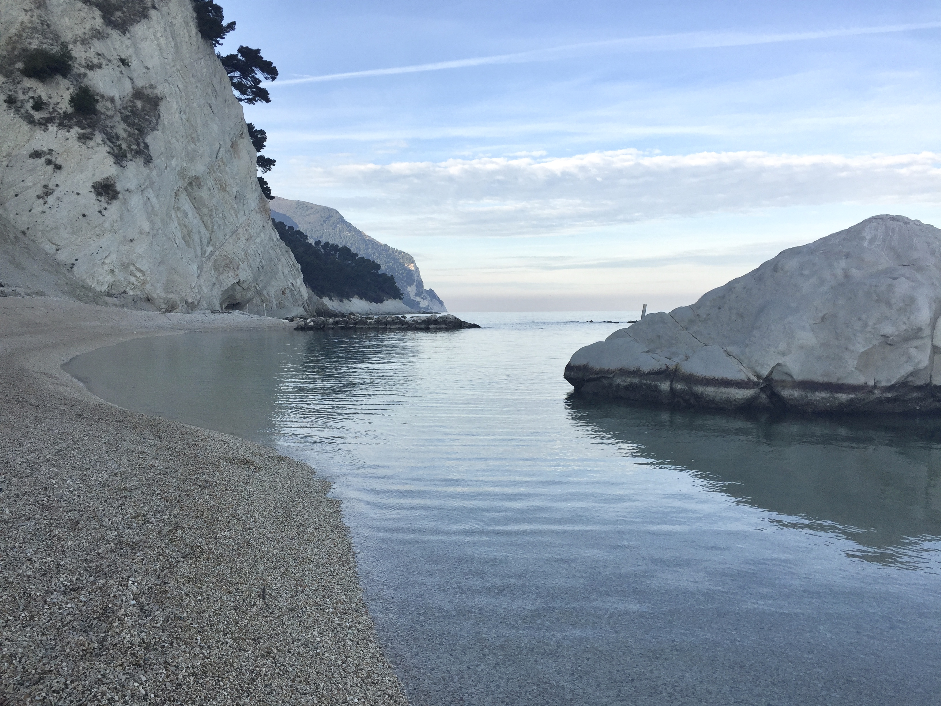 Numana